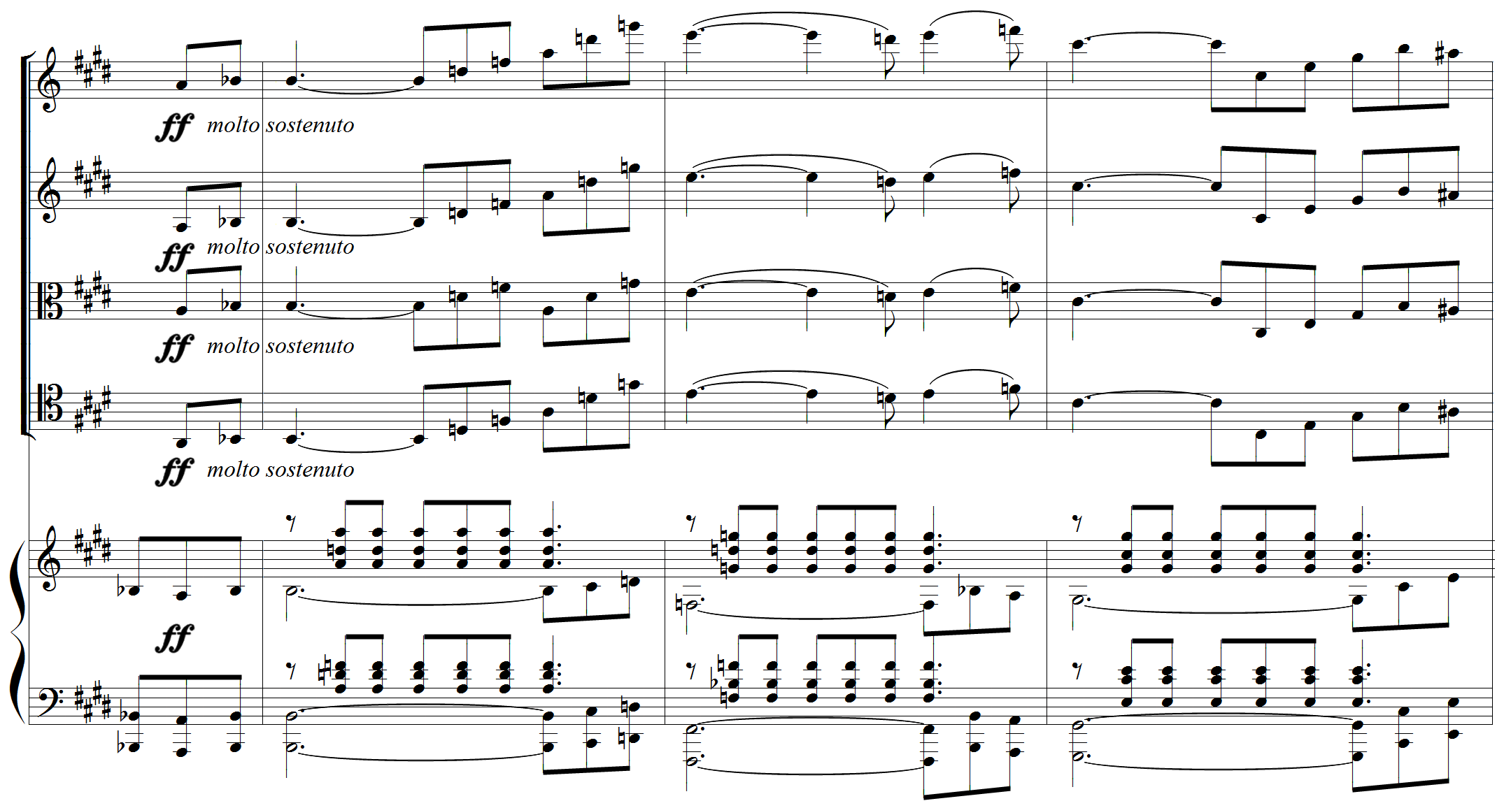 Quintette pour piano et cordes, op.42 de Louis Vierne - climax du second mouvement